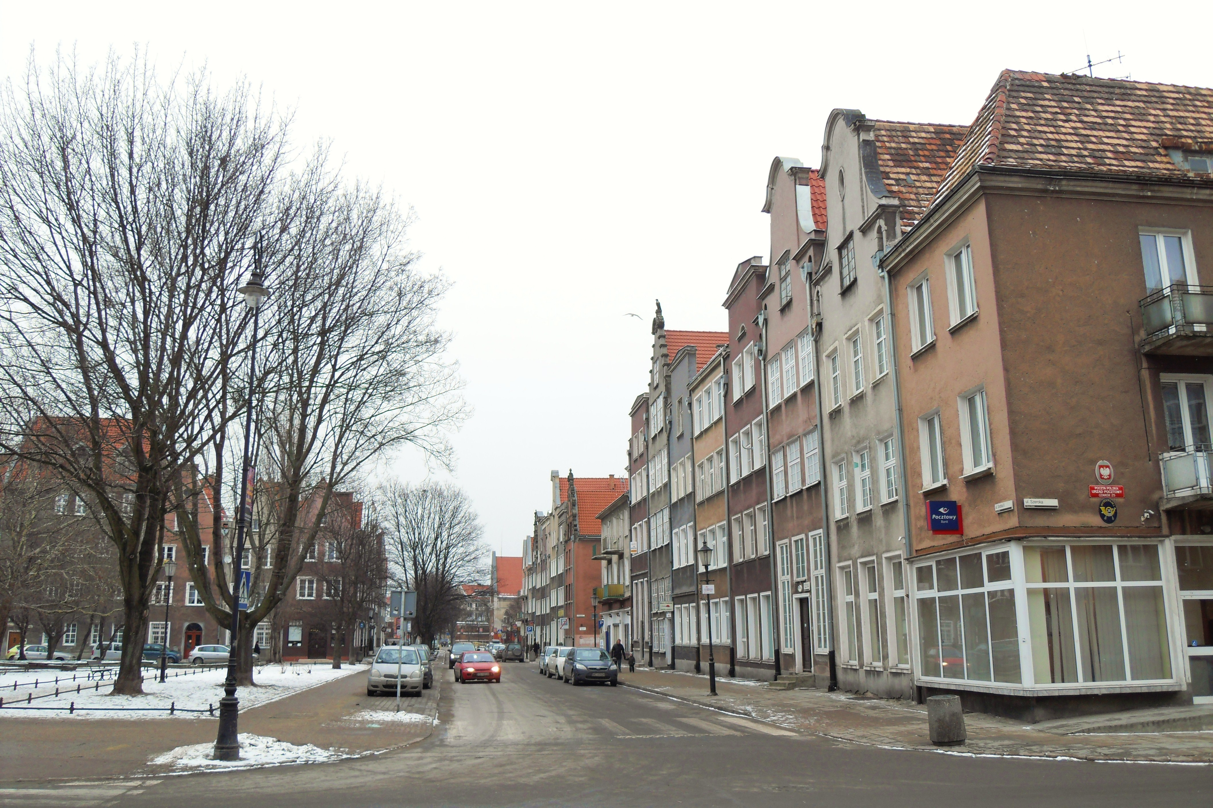 Gdańsk Główne Miasto, ul. Grobla II (od ul. Szerokiej).